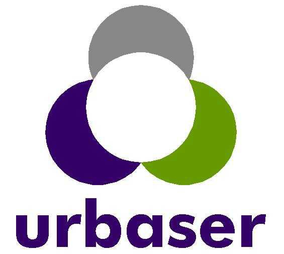 Logotipo de Urbaser S.A.